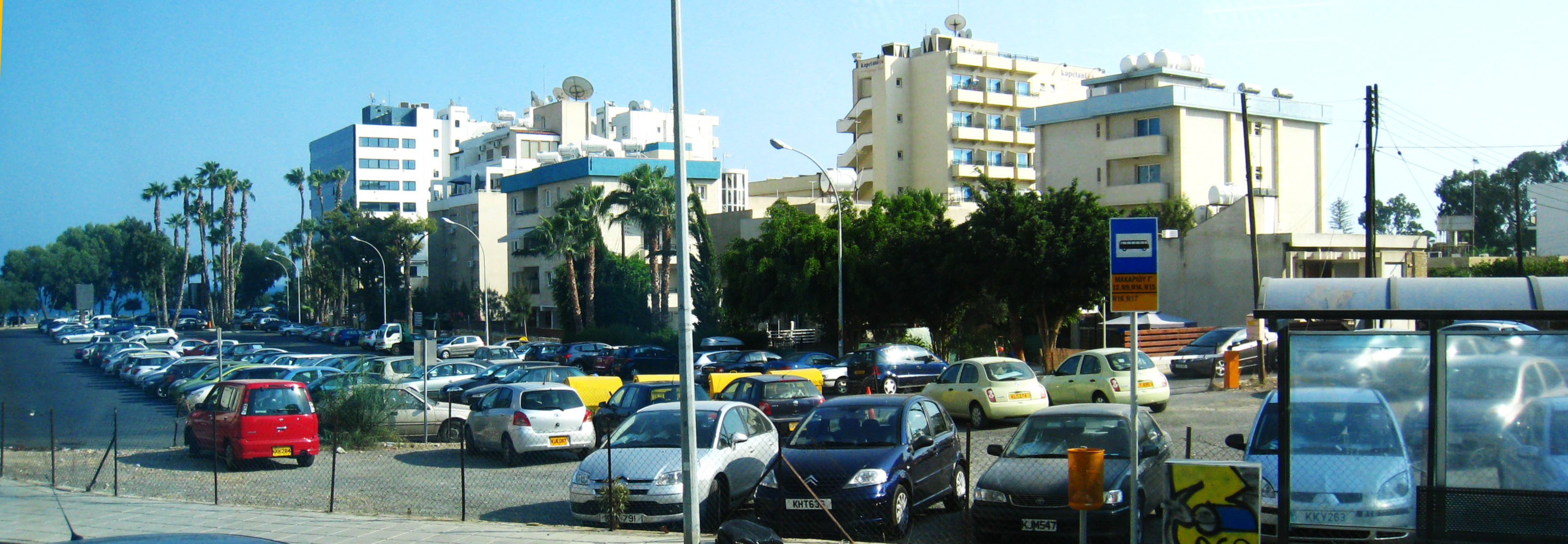 Лимассол (Кипр) Автостоянка у многоэтажных домов